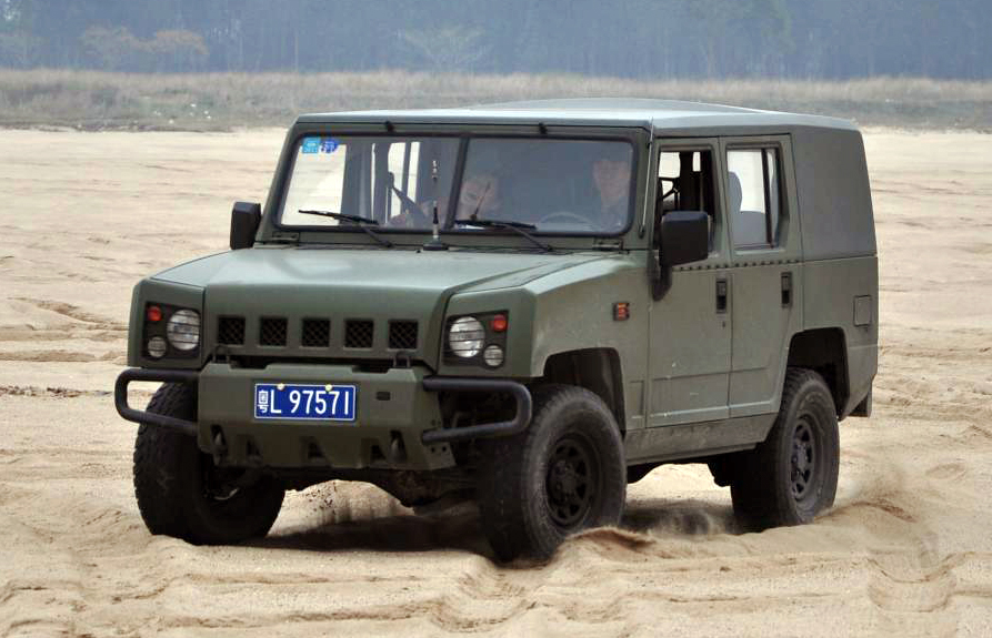 Beijing BJ2022LC Warrior